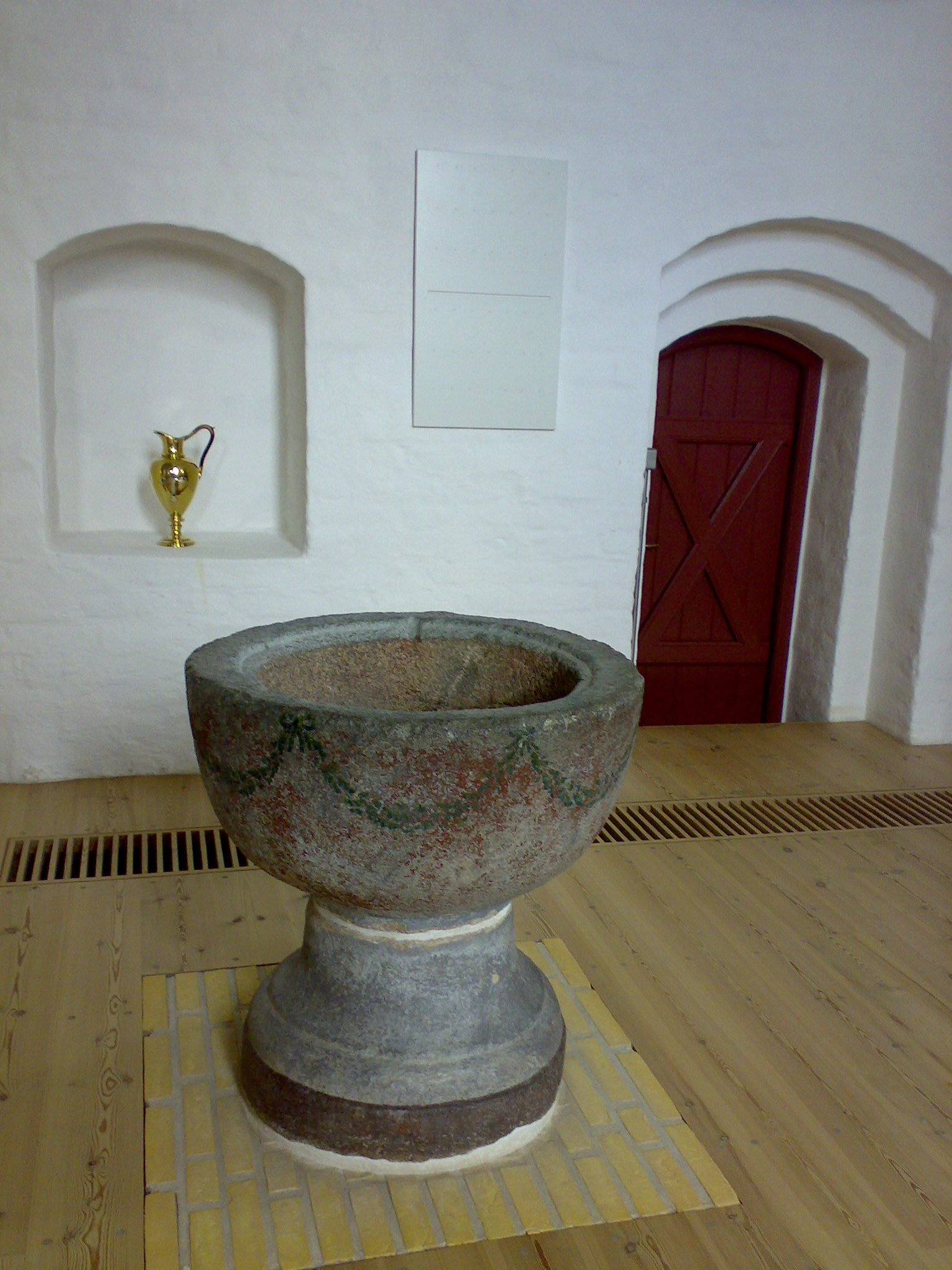 Baptist fontena in Nibe Church, Denmark